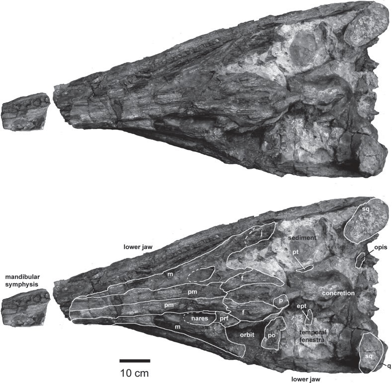 Brachauchenius sp. VL: skull in dorsal view with highlighted bone sutures (below); non-stereoscopic images. Abbreviations: a – angular; art – articular; d – dentary; ept – epipterygoid; f – frontal; j – jugal; m – maxilla; opis – opithoticum; p – parietal; pm – premaxilla; po – postorbital; prf – prefrontal; pt – pterygoid; q – quadrate; sa – surangular; sq – squamosal.